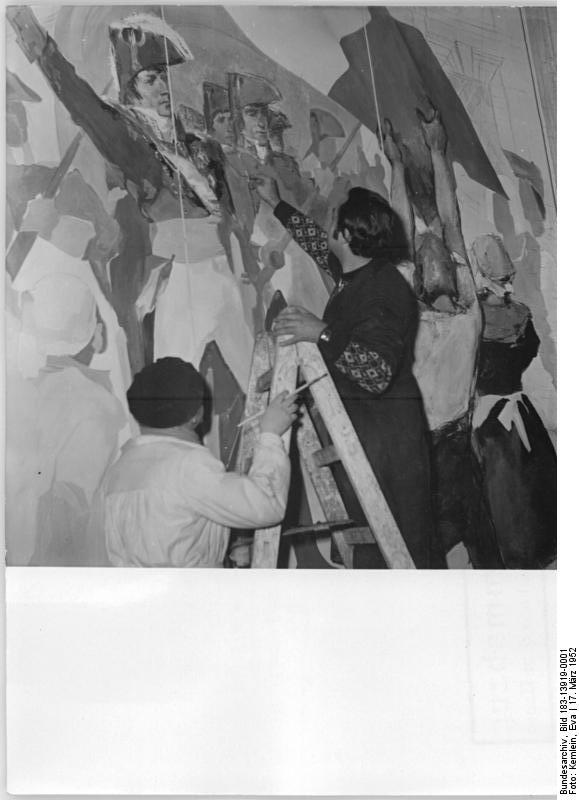 Zentralbild Kemlein 17.3.52 Zum 125. Todestag von Ludwig van Beethoven. Nationalpreisträger Bert Heller ist zur Zeit mit den Vorbereitungen für eine Ausstellung zum 125. Todestag Beethovens beschäftigt. UBz: Bert Heller arbeitet an einer Szene aus der französischen Revolution.